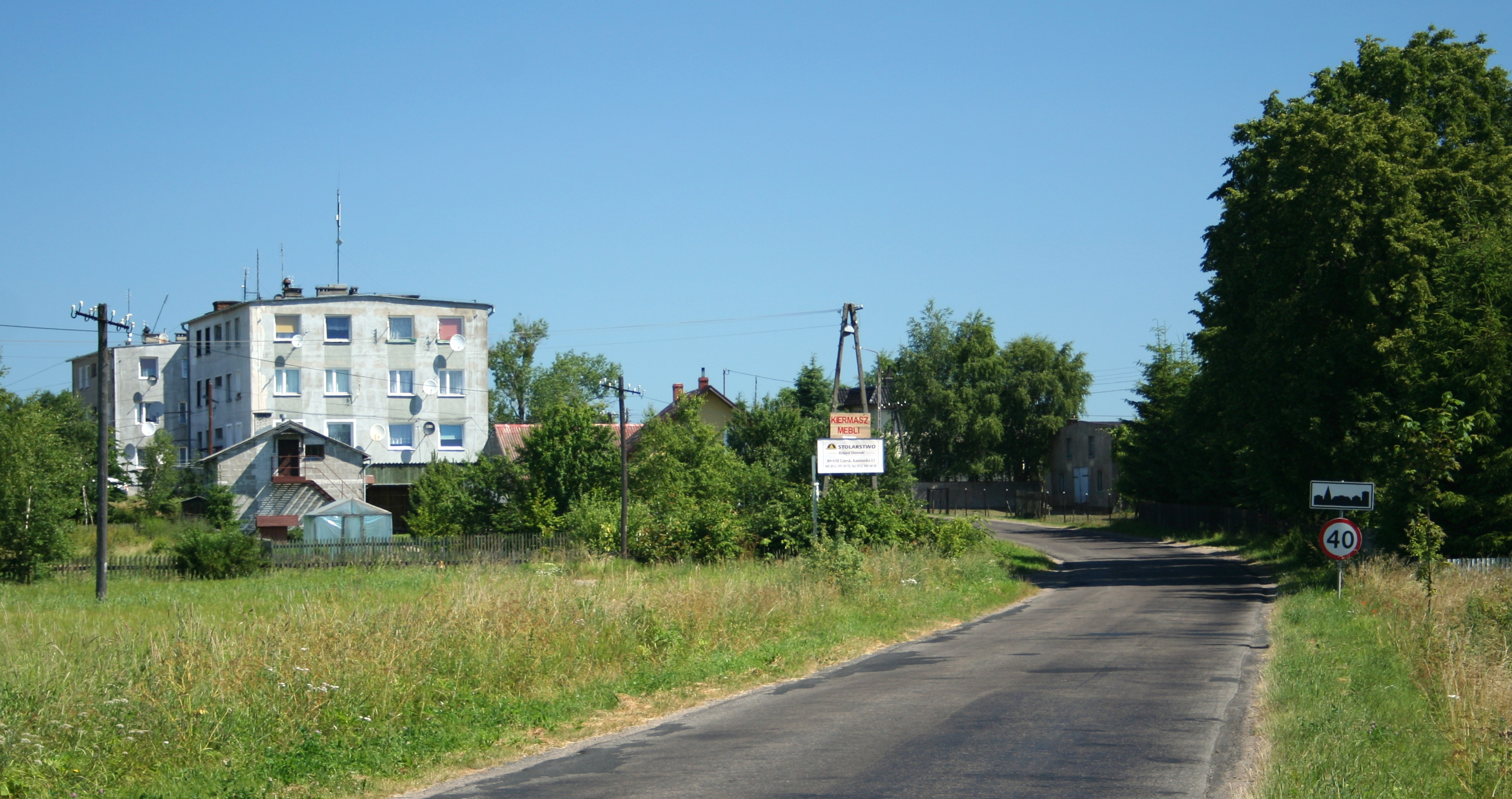 Fragment wsi Kamionka, powiat chojnicki